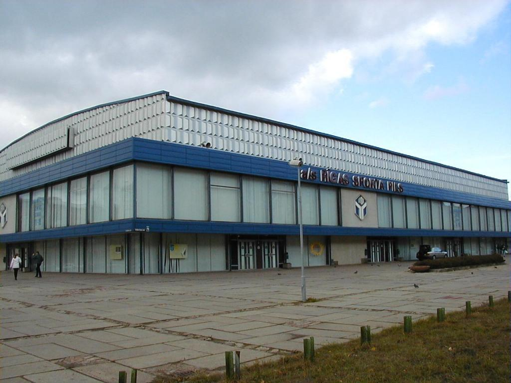 Rīga, Sporta pils 2002-10-02